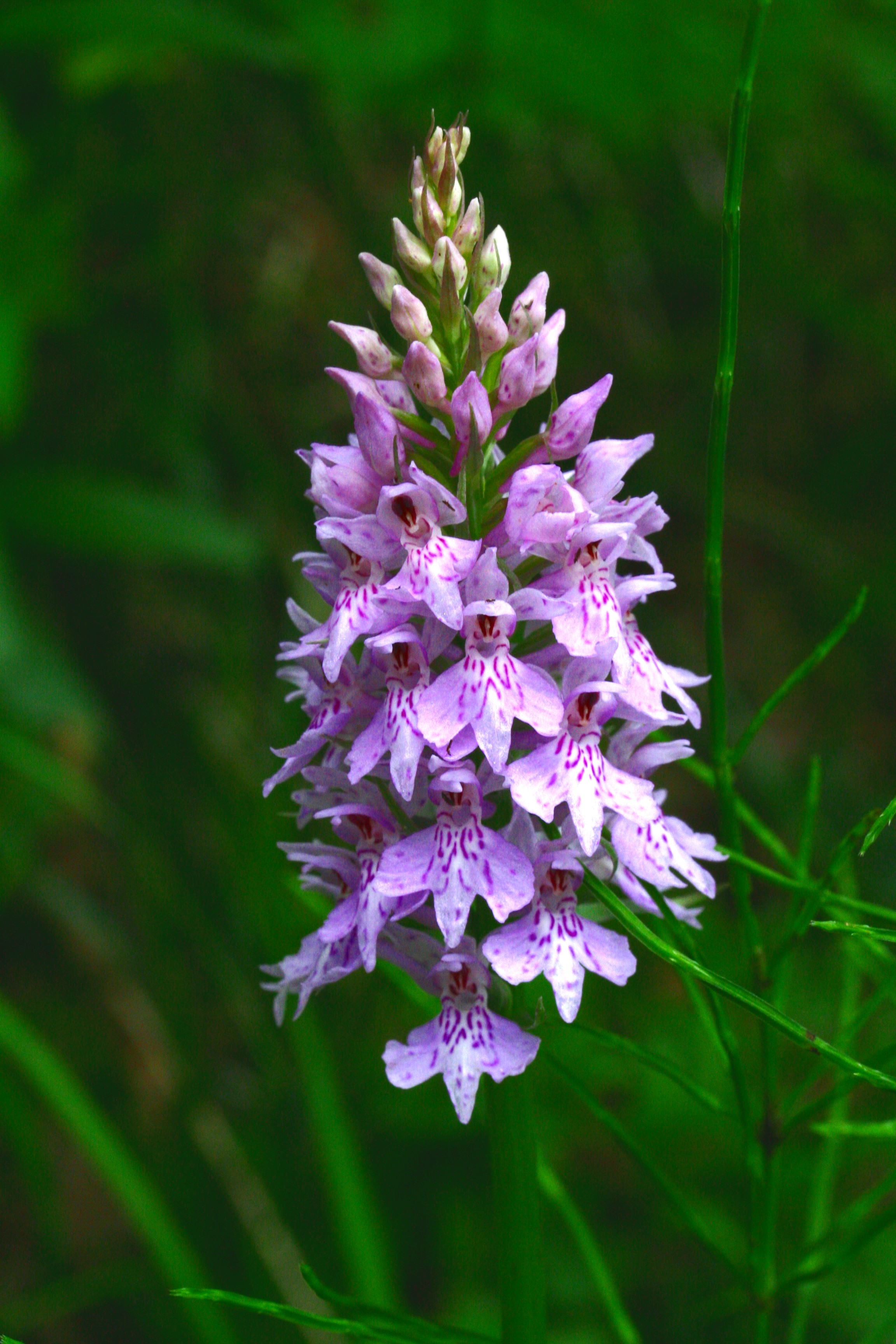 Concordia - Località: Val Piana, Limana (BL), 850 m s.l.m.